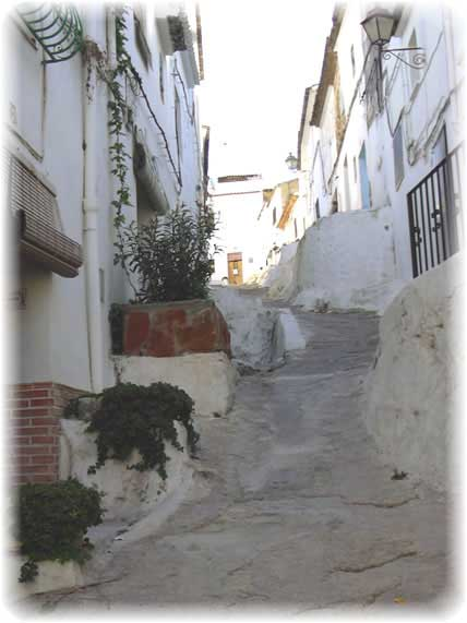 Imagen Calle la Hoz de Oliva (Valencia) Enlace original: mostrada en la página: El Webmaster ha verificado por correo electrónico su identidad y que la imagen se licencia com GFDL--Orgullomoore - § 18:43 10 dic 2005 (CET)